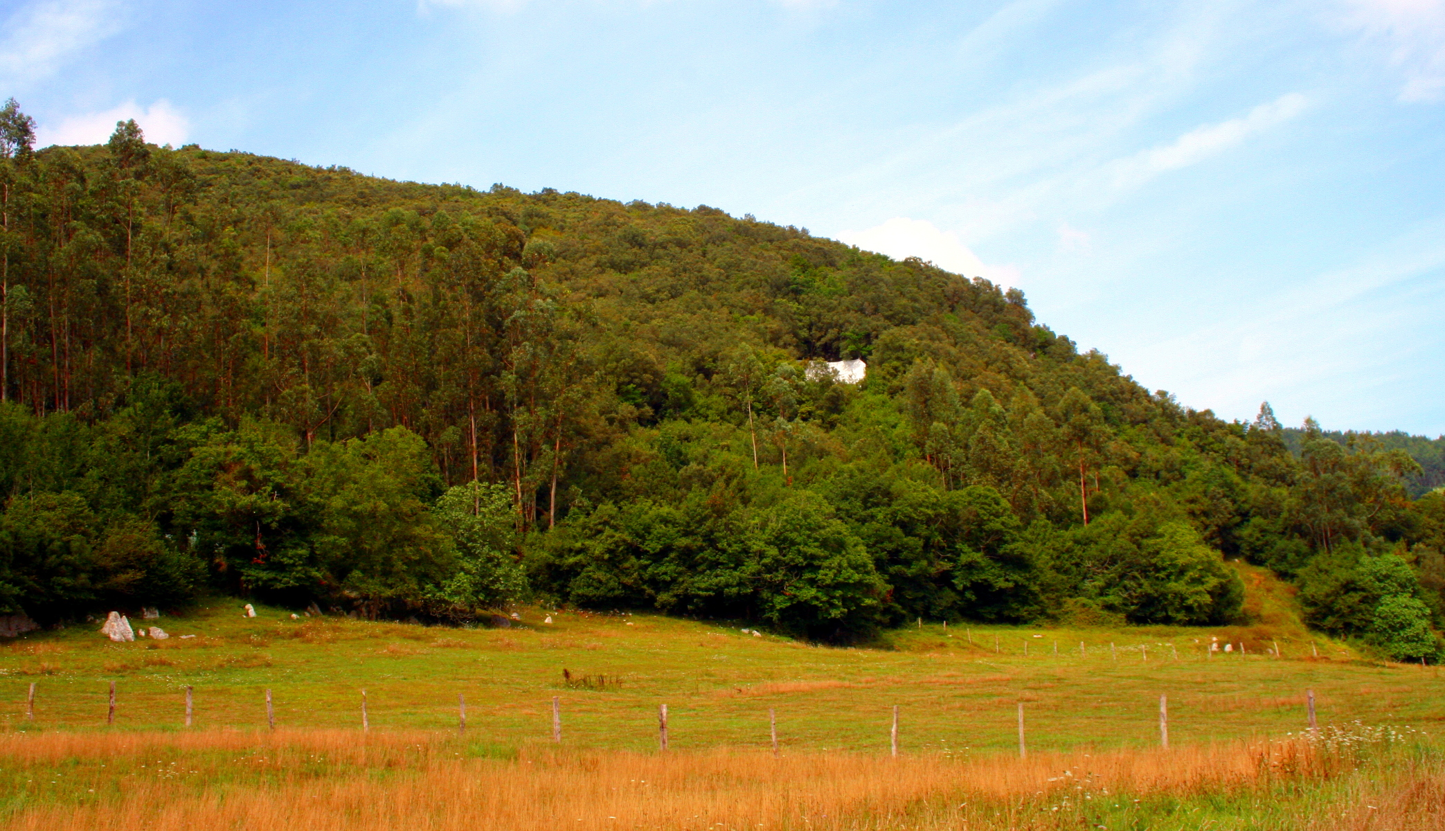 Sierra que alberga la Cueva de La Garma, protegida por una lona blanca, Cantabria, España.